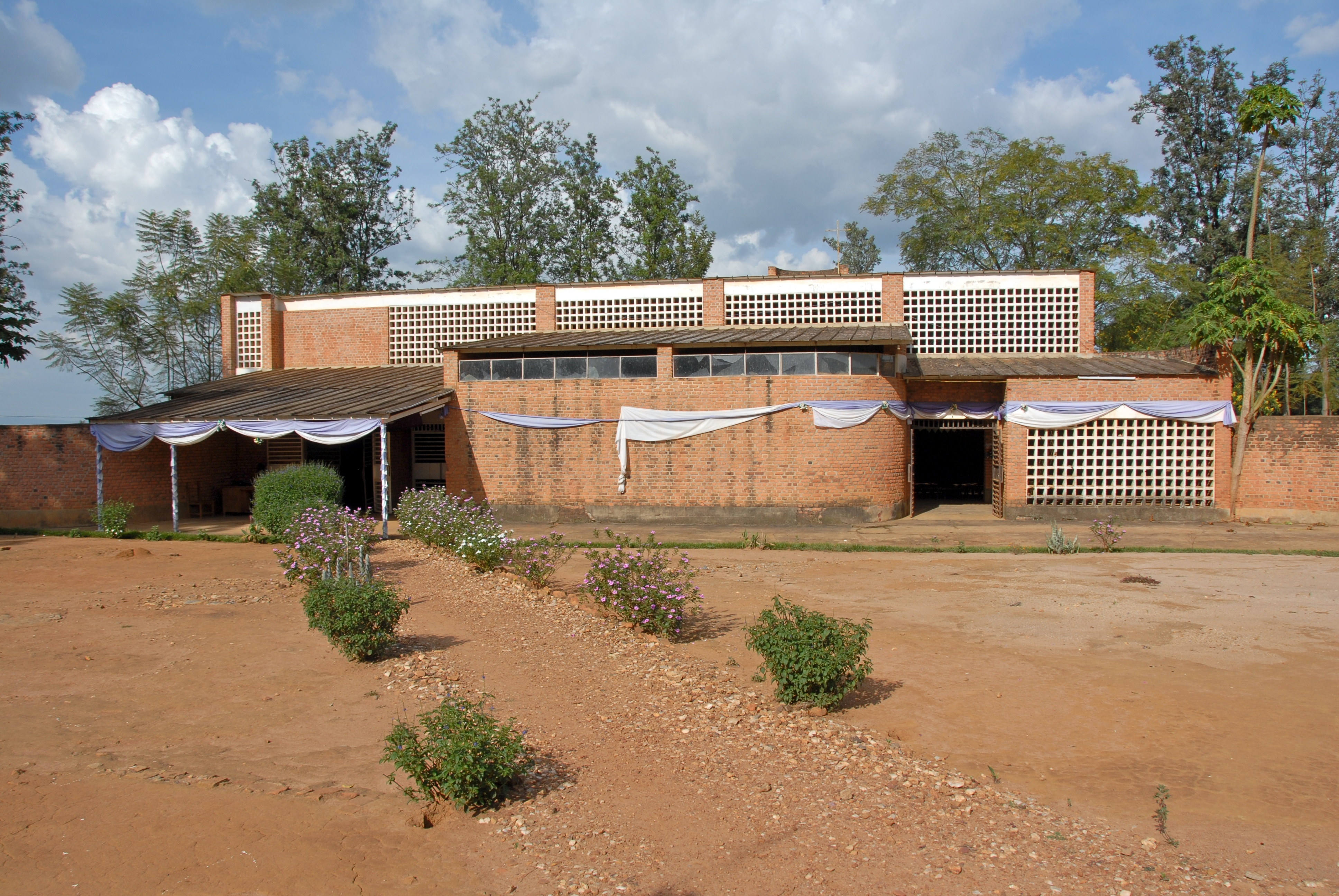 Nyamata Genocide Memorial Church